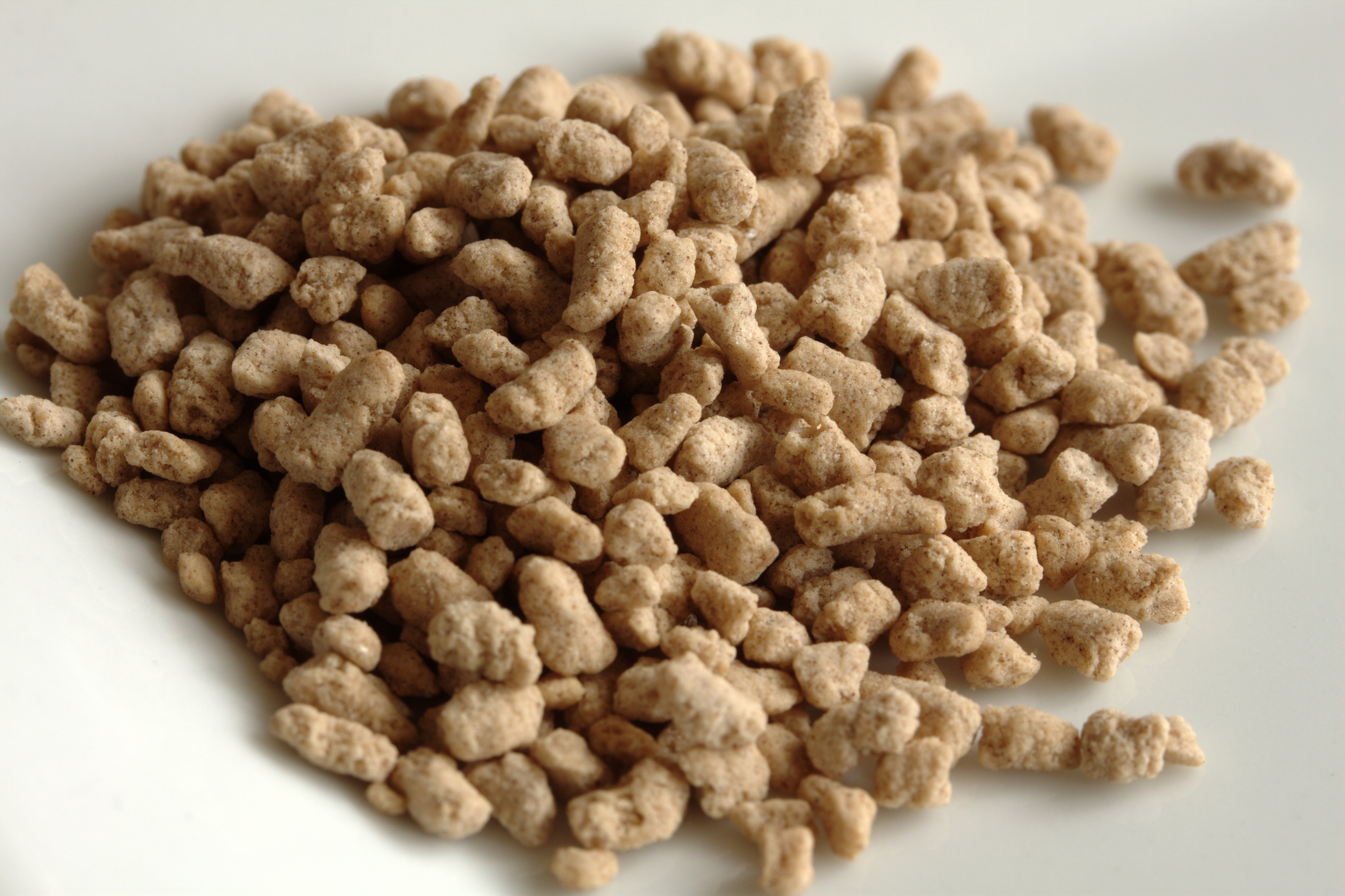 Granulat von löslichem Tee, Zitronenaroma, ca. ein Esslöffel voll